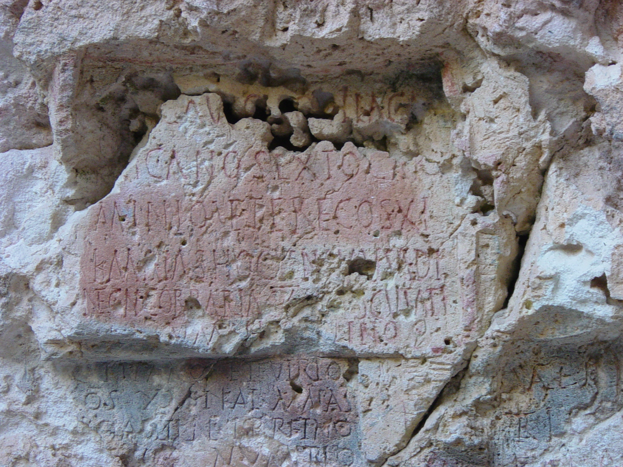 Epigrafia Calescoves